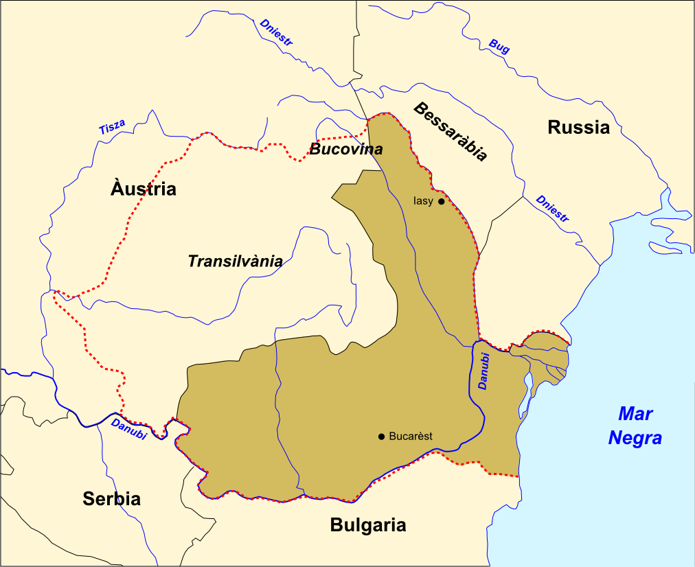 Romania en 1878.